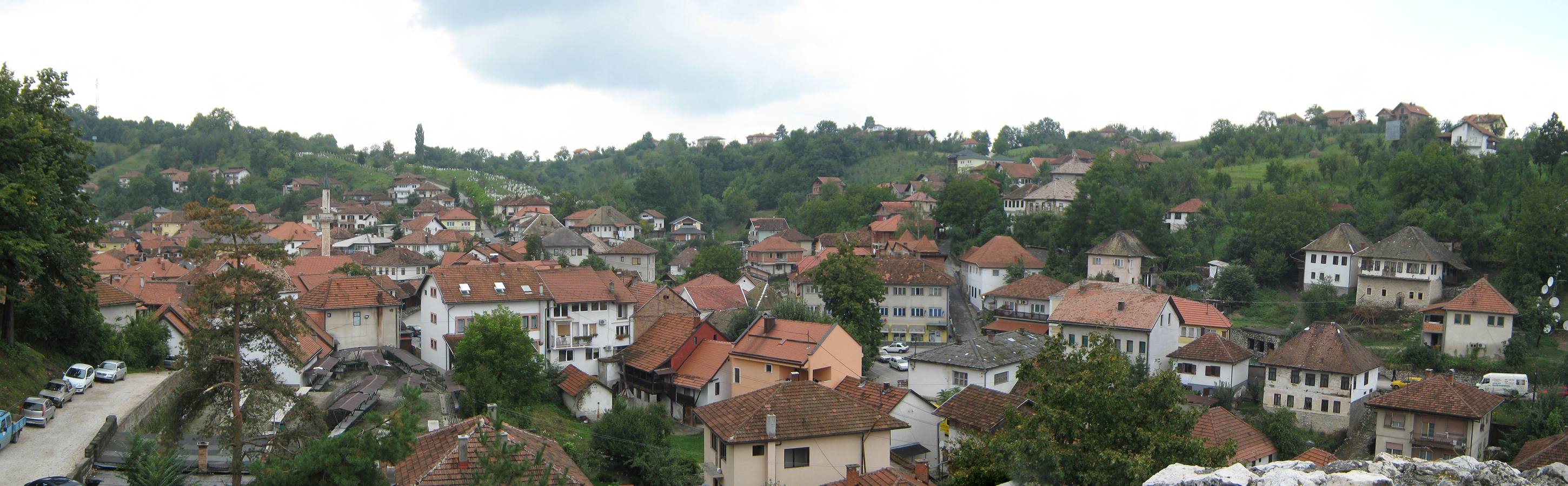 Тешањ, ФБиХ, БиХ